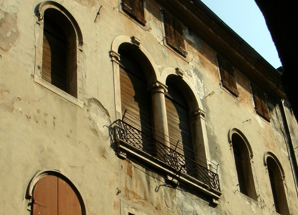 Serravalle di Vittorio Veneto (Treviso): bifora di Palazzo Filomena (XV sec.).